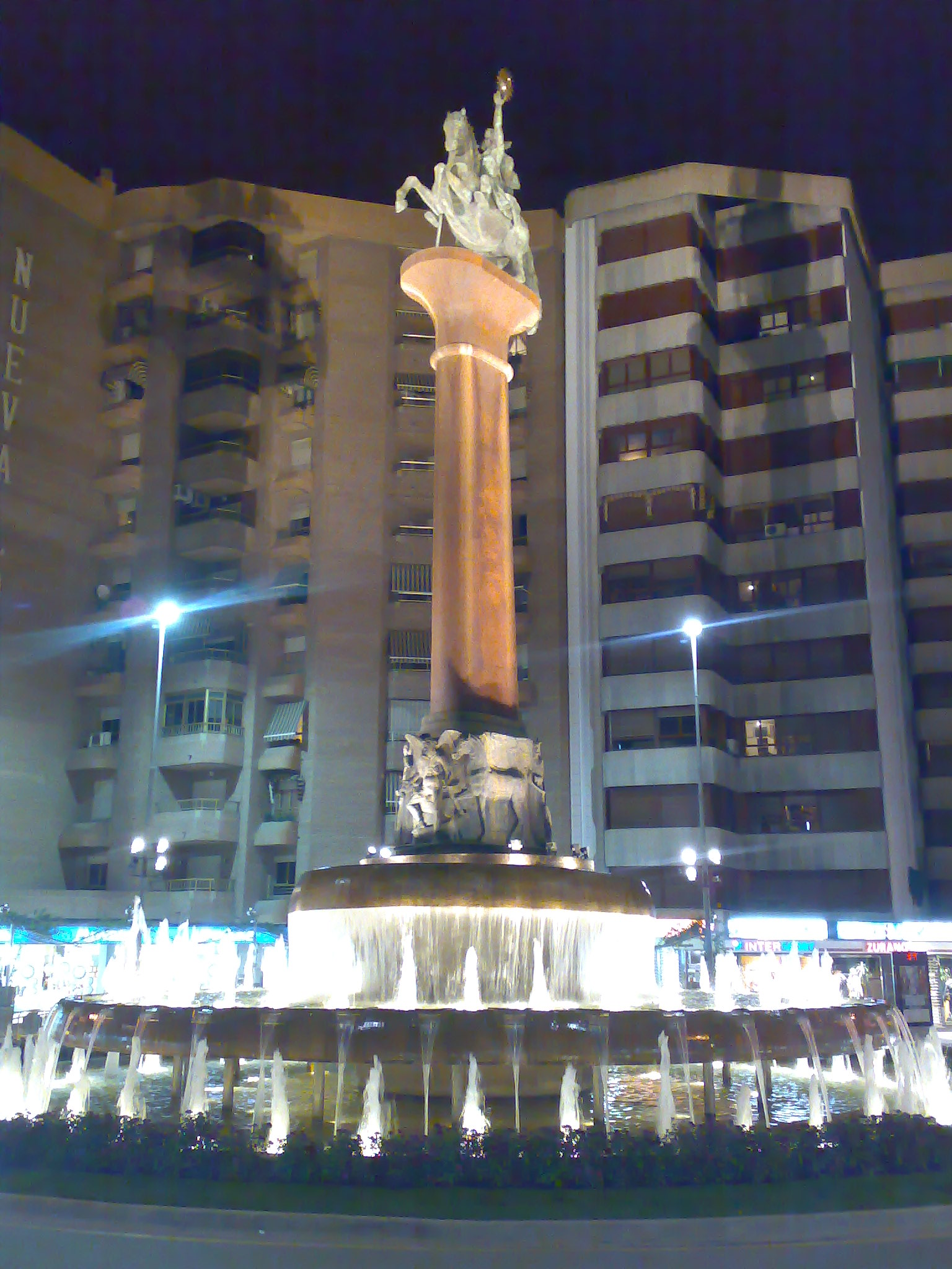 El Óvalo Santa Paula, centro de la ciudad de Lorca (Murcia), de noche.